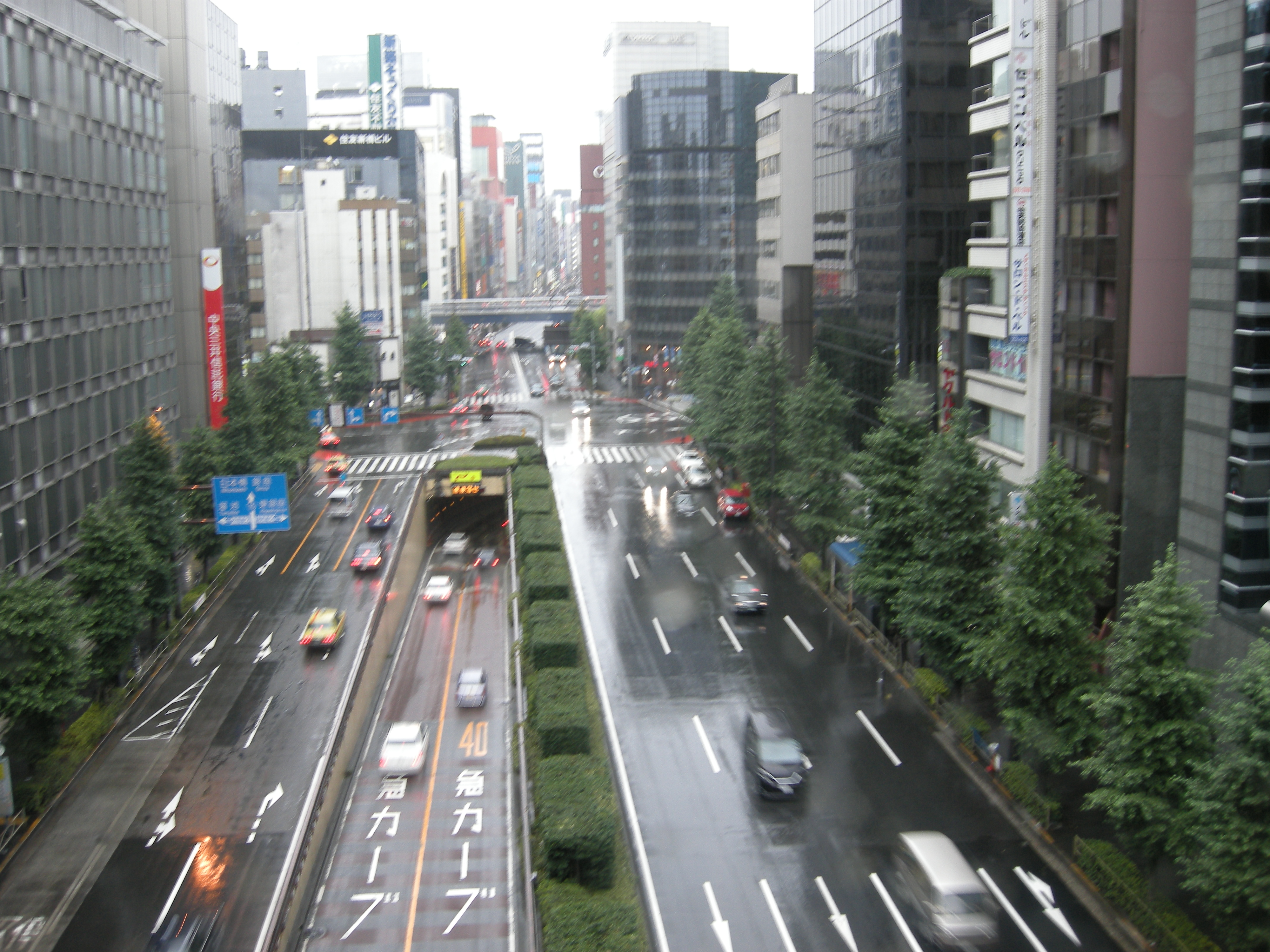 Shinbashi, Tokyo